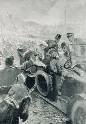 Das Attentat auf den Erzherzog-Thronfolger Franz Ferdinand von Österreich und seine Gemahlin in Sarajewo am 28. Juni 1914. Im Wagen auf dem Klappsitz Oskar Potiorek, rechts davon auf dem Trittbrett stehend Franz von Harrach, der Chauffeur ist Leopold Lojka. Zeitungsholzstich von Felix Schwormstädt für die Leipziger Illustrierte Zeitung. Die Zeichnung ist frei erfunden: Das Geschehen wird vom Zeichner dramatisiert. Laut Illustrierte Zeitung sei das Bild nach der Skizze eines Augenzeugen gefertigt. Schwormstädt selber war nicht in Sarajewo (Lars U. Scholl: Felix Schwormstädt 1870-1938. Maler-Pressezeichner-Illustrator. Herford 1990, S. 32).